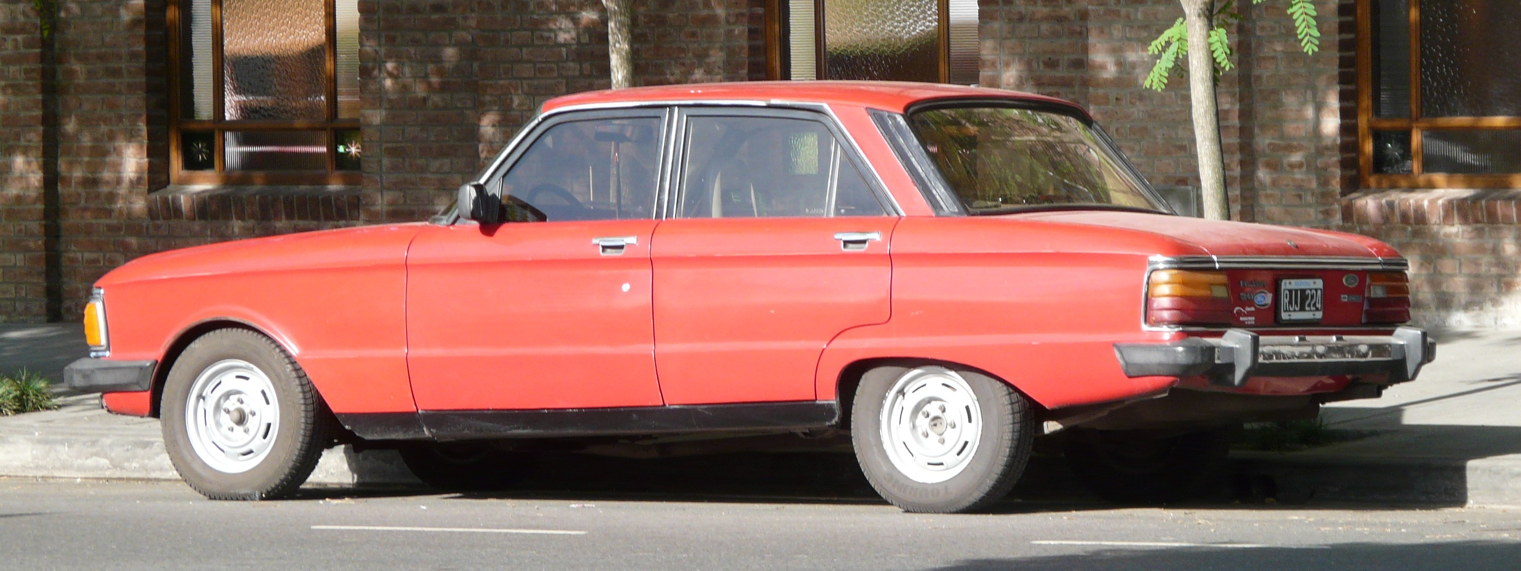 Ford Falcon (Argentinian 1982-1990 model), Buenos Aires, Argentina, November 2008.